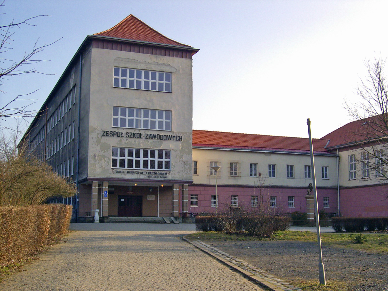 Zespół Szkół Zawodowych im. Komisji Edukacji Narodowej w Brzegu Dolnym